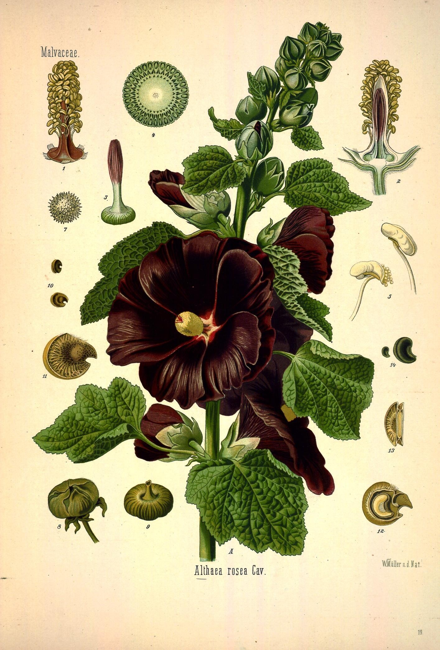 Stockrose. A blühender Stengel in natürl. Grösse; 1 Staubgefässröhre, vergrössert; 2 Blüthe im Längsschnitt, desgl.;3 Stempel, desgl.; 4 Fruchtknoten im Querschnitt, desgl.; 5 Staubgefässe, geöffnet, desgl.; 6 dasselbe, geschlossen, desgl.; 7 Pollenkorn, desgl.; 8 Frucht mit Fruchtkelch, natürl. Grösse; 9 dieselbe ohne Fruchtkelch, desgl.; 10 einzelne Früchtchen, desgl.; 11 eins dergl., vergrössert; 12 dasselbe zerschnitten, von der Breitseite, desgl.; 13 dasselbe zerschnitten, von der schmalen Seite, desgl.; 14 Same, natürl. Grösse und vergrössert.